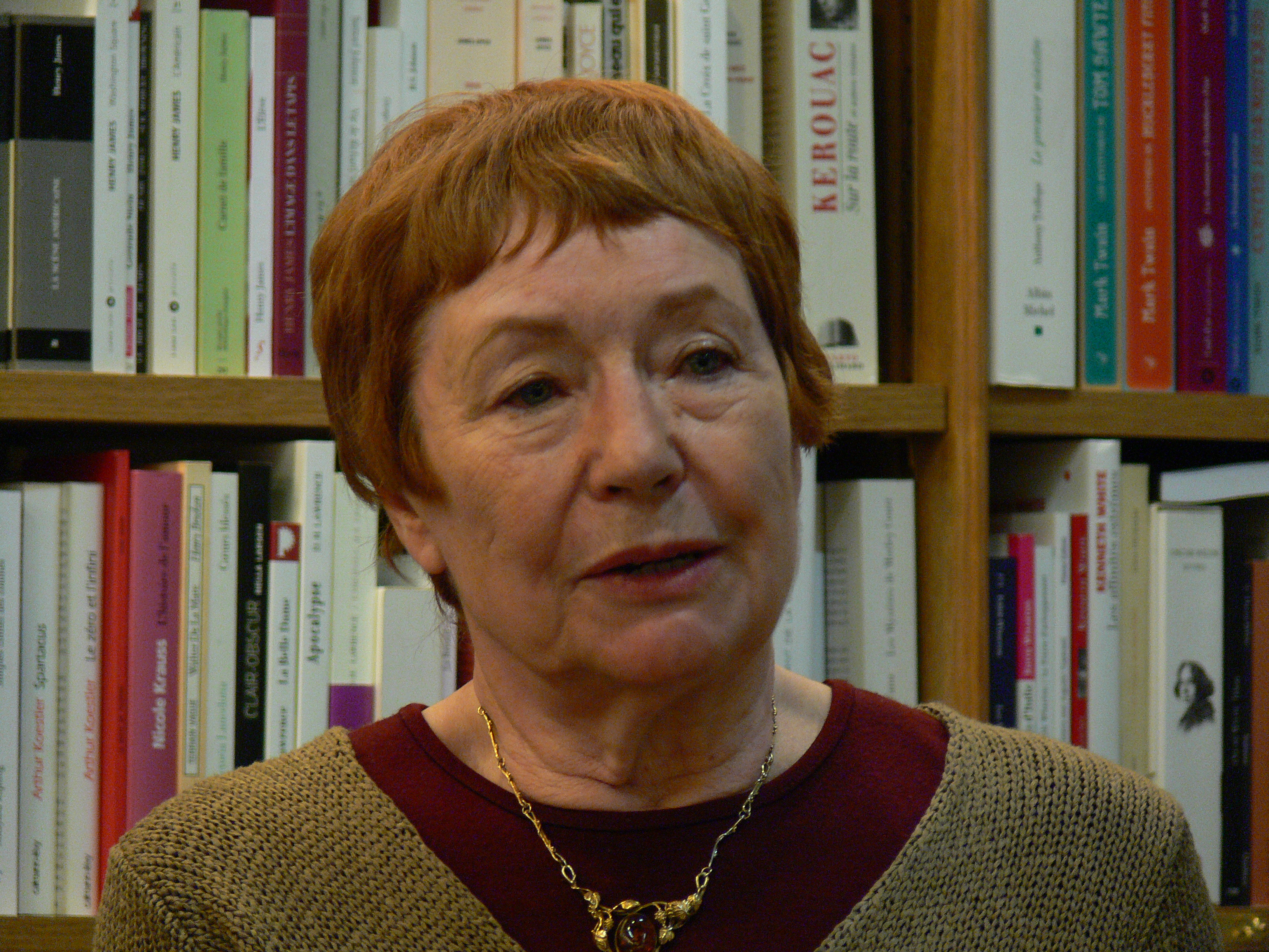 La poète Marie-Claire Bancquart lors d'une rencontre à la librairie Tschann à Paris